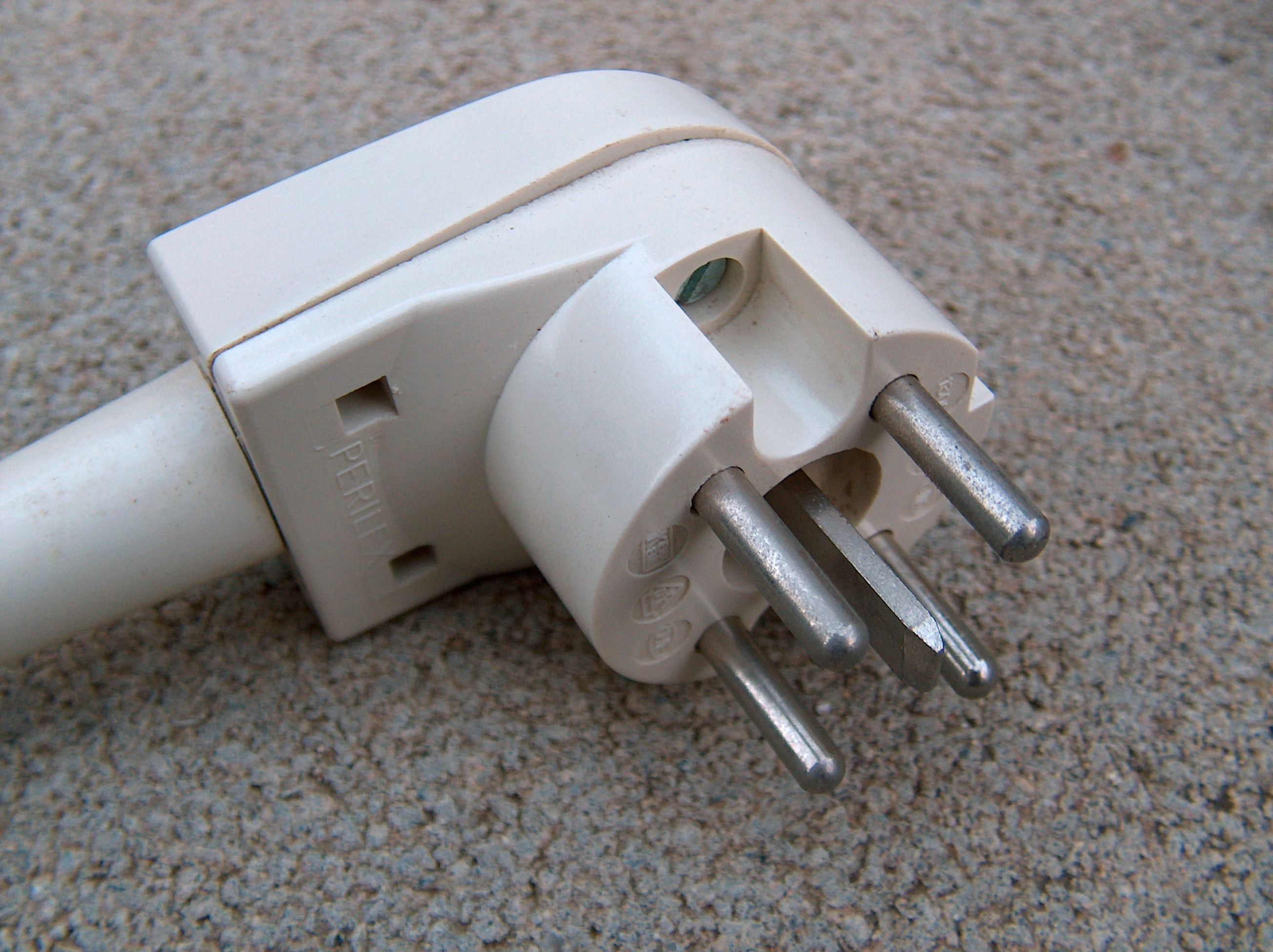 Perilex-Drehstromstecker. 16 Ampere, 400 Volt. 3L+N+PE. Nach DIN 49446 genormt